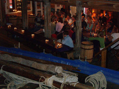 Bilde av medlemskveld i Bragdøya Kystlag på Bragdøya